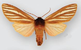 Pseudohemihyalea ambigua female